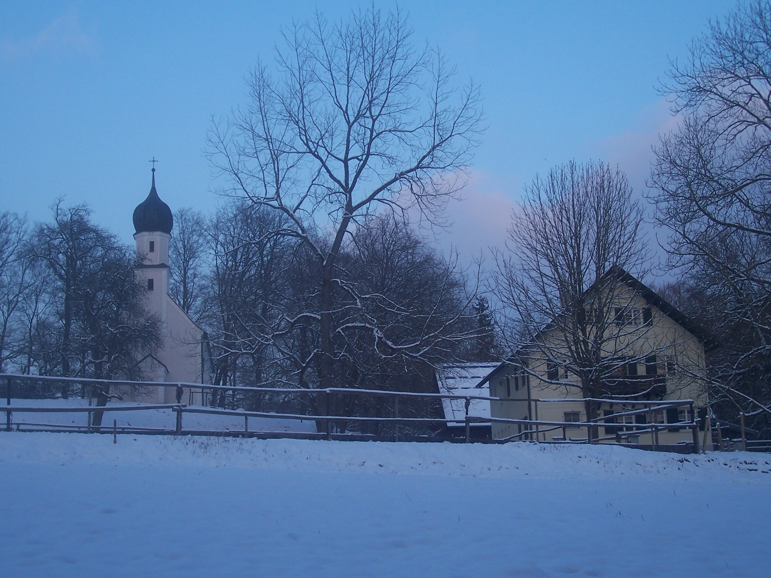 Katholische Wallfahrtskirche Sankt Leonhard